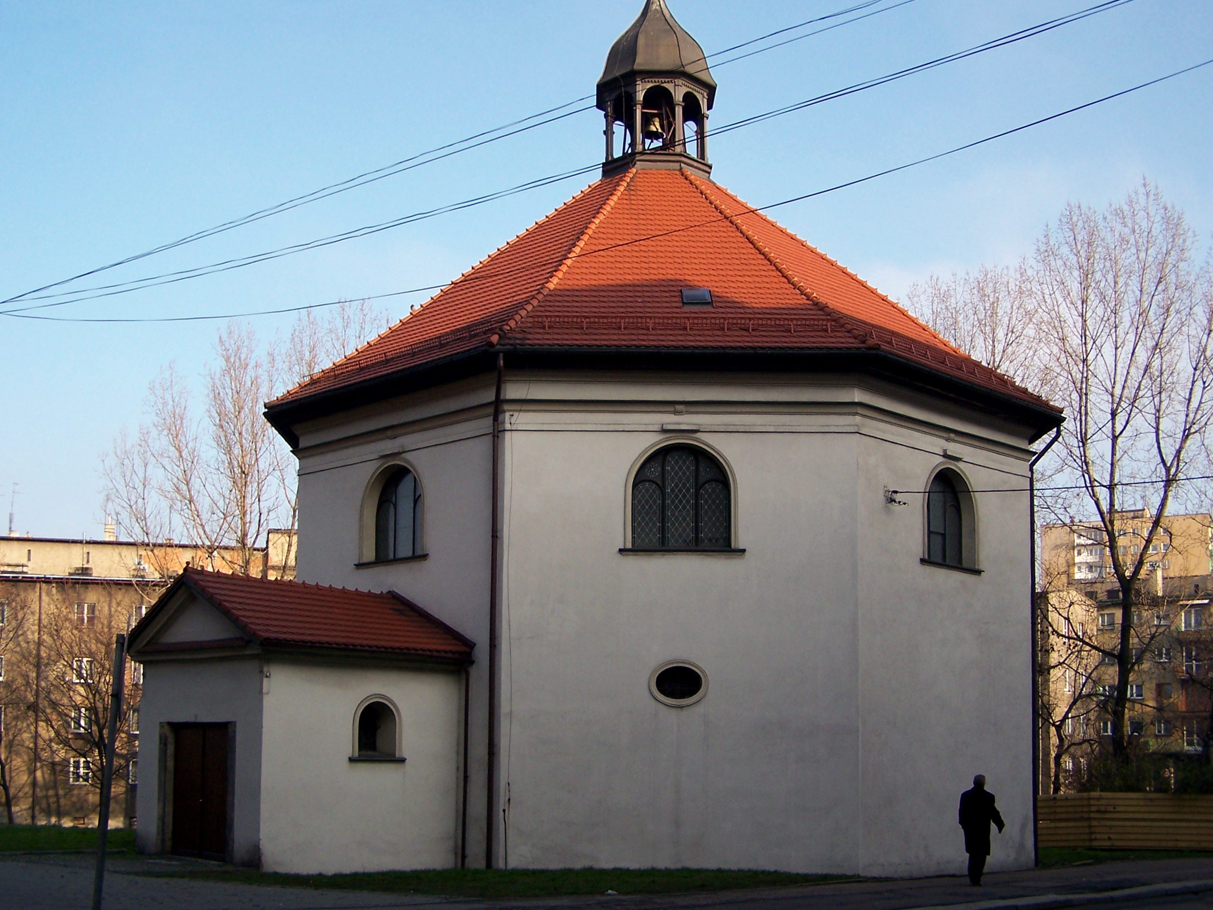 Kościół pw. Świętego Ducha w Bytomiu (dawniej kościół Bożogrobców)